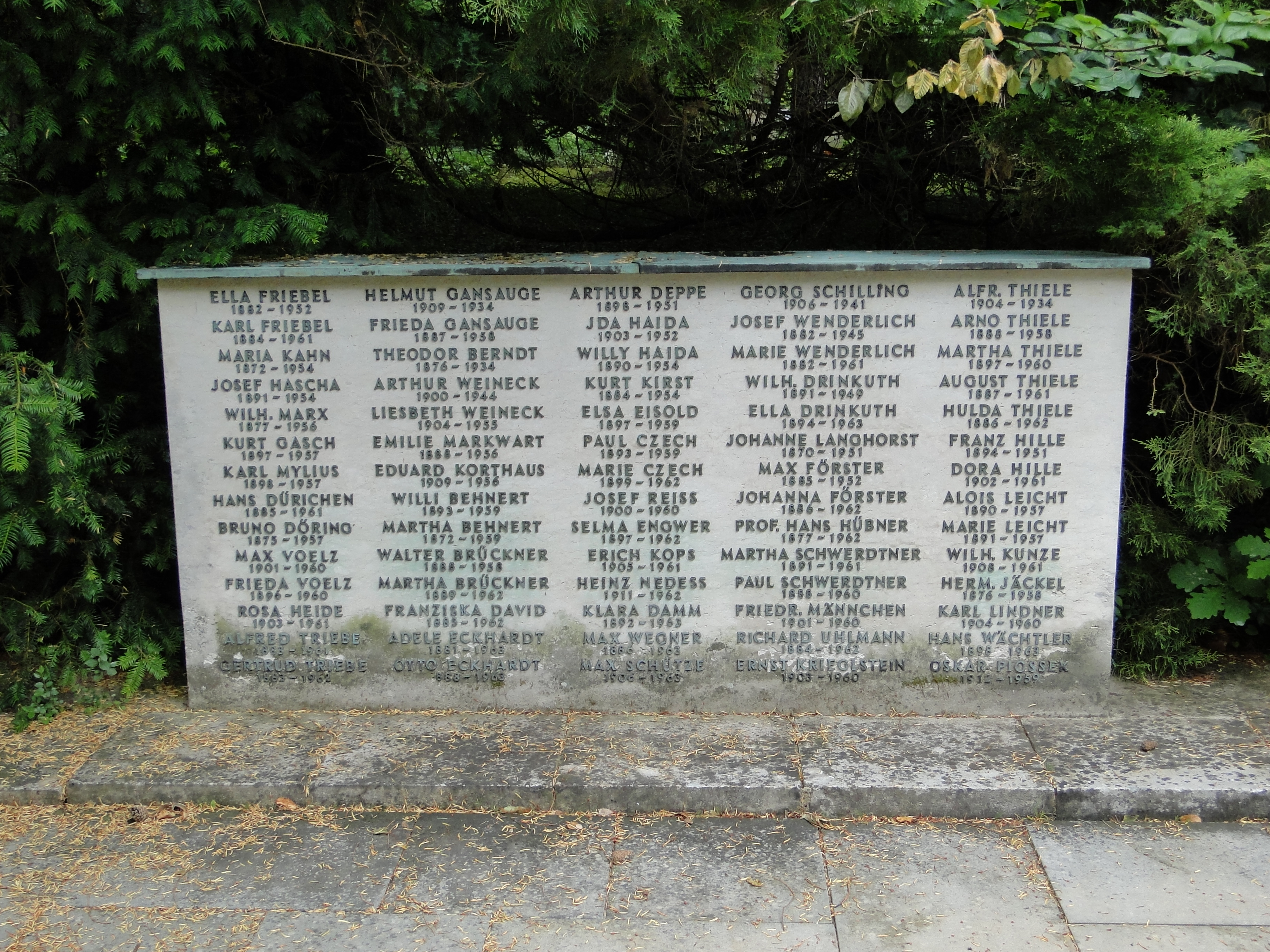 Urnengräber im Ehrenhain des Heidefriedhofs in Dresden (u.a. Alfred Thiele, Arthur Weineck, Helmut Gansauge)